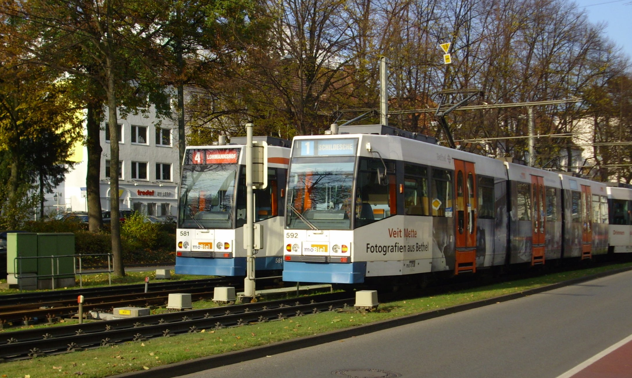 Dwa składy tramwajowe M8D w okolicach przystanku „Rathaus”; skład linii 4 na torze dodatkowym w trakcie zmiany kierunku jazdy.